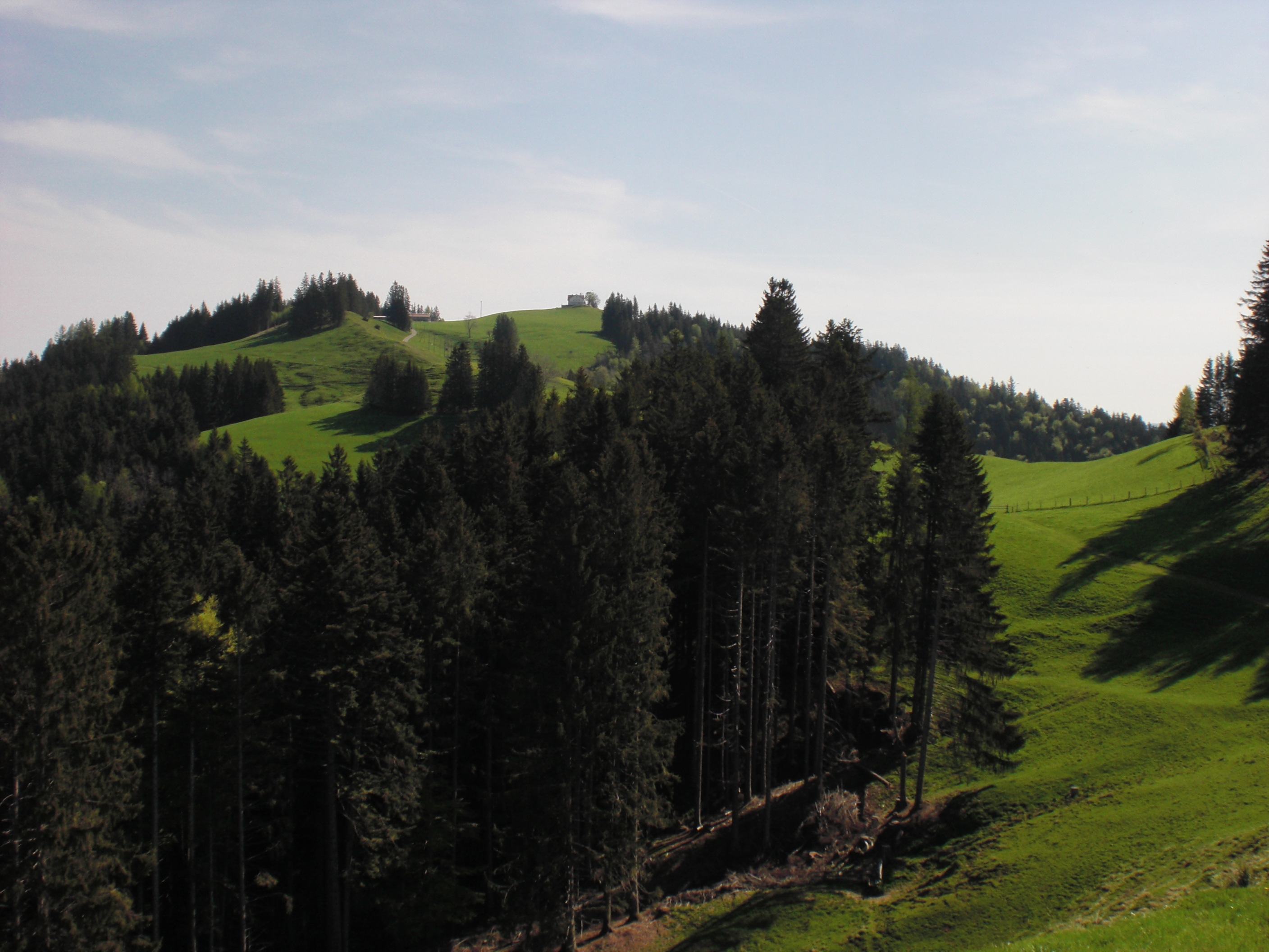 Sondereggersweid, Blick gegen den Gäbris